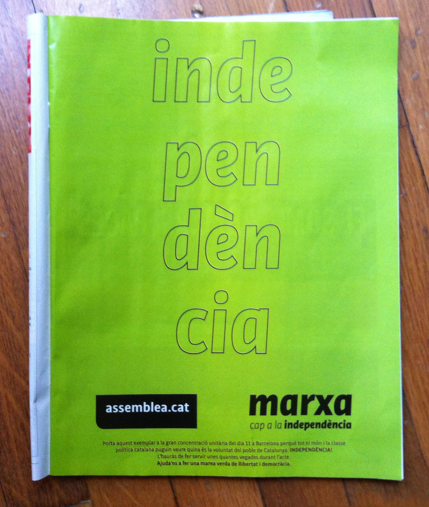 Cartolina verda que feta servir durant la manifestació convocada per l' ANC el dia 11 de setembre de 2012